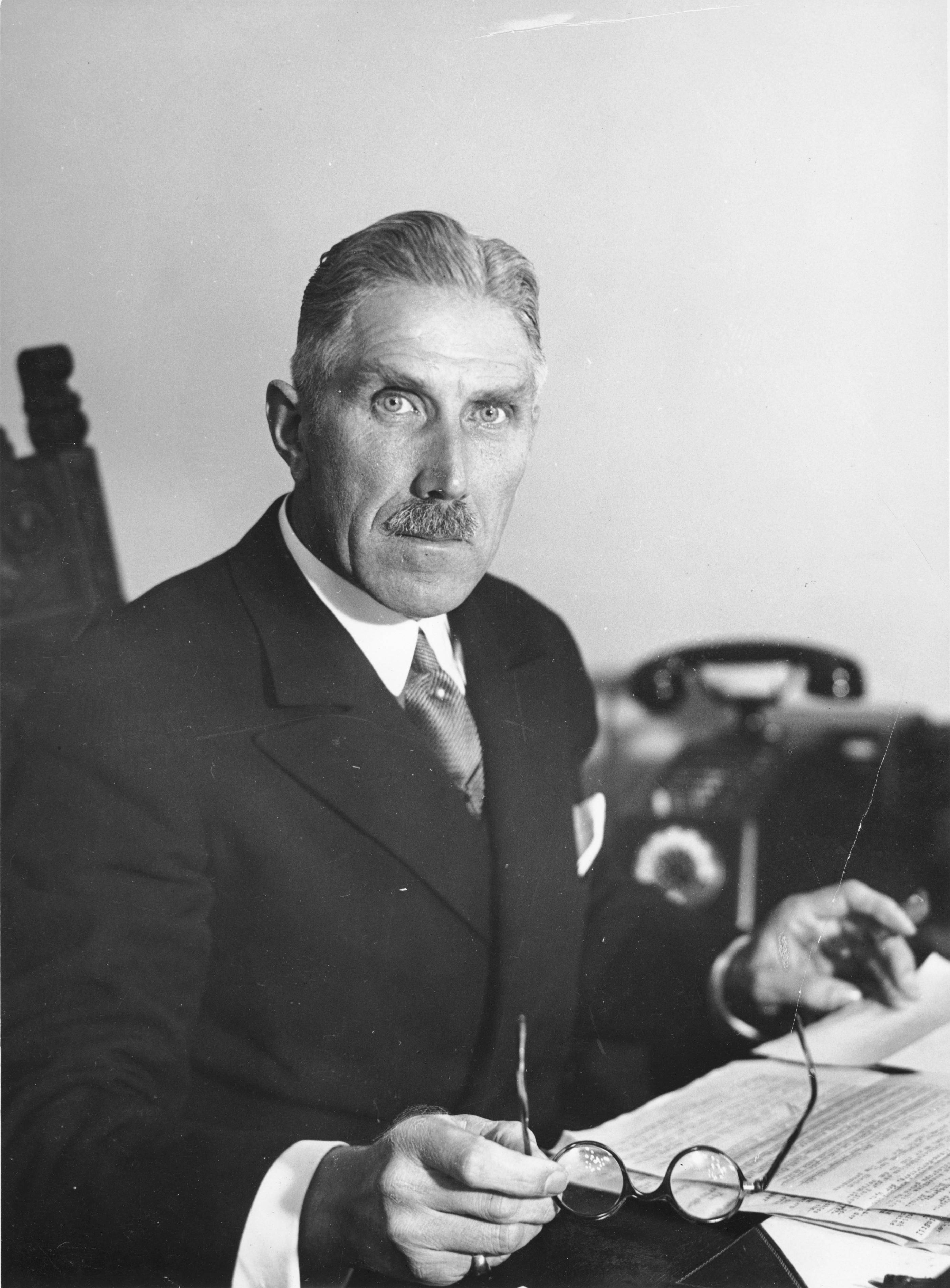 Geburtstag des Vizekanzlers. Der Stellvertreter des Reichskanzlers, Vizekanzler Franz von Papen, wird am 29.10. 54 Jahre alt. Herr von Papen, der sich um die Einigung des nationalen Deutschland ein historisches Verdienst erworben hat, ist gebürtiger Westfale und war zunächst aktiver Offizier, 1913 Hauptmann im Grossen Generalstab, 1914-16 Militär-Attachè in Washington und in Mexiko. In den beiden letzten Kriegsjahren nahm Herr von Papen am Feldzug teil und war zuletzt Oberstleutnant und Chef des Stabes der 4. Osmanischen Armee. Als Mitglied des Zentrums hat er dem Preussischen Landtag von 1920 bis 1928 und von 1930 - 1932 angehört. Am 1. Juni 1932 übernahm Herr von Papen auf Wunsch des Reichspräsidenten das Reichskanzleramt, das er bis zum 2. Dezember innehatte. Seit dem 30. Januar 33 , dem Tag der Amtsübernahme der Regierung Hitler, ist Herr von Papen Stellvertreter des Reichskanzlers. 37161-33